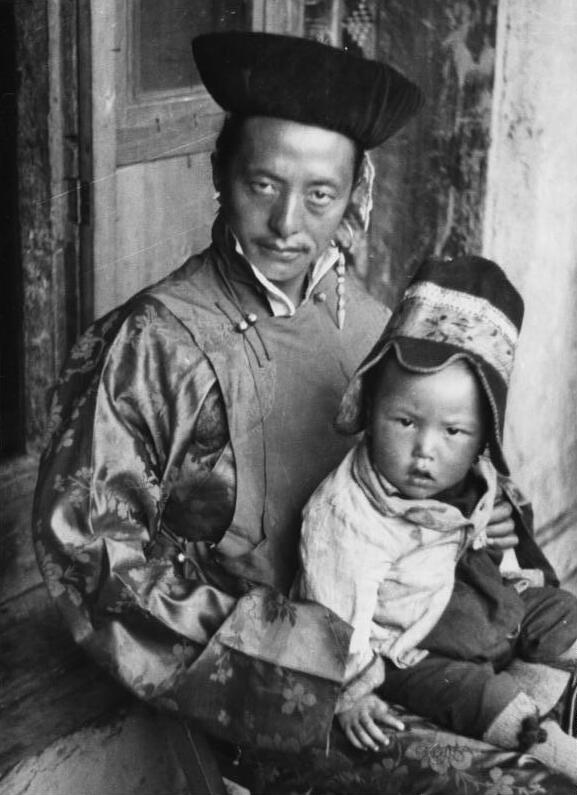 Lachen, der junge Pipon mit Familie (Bürgermeister mit Sohn)